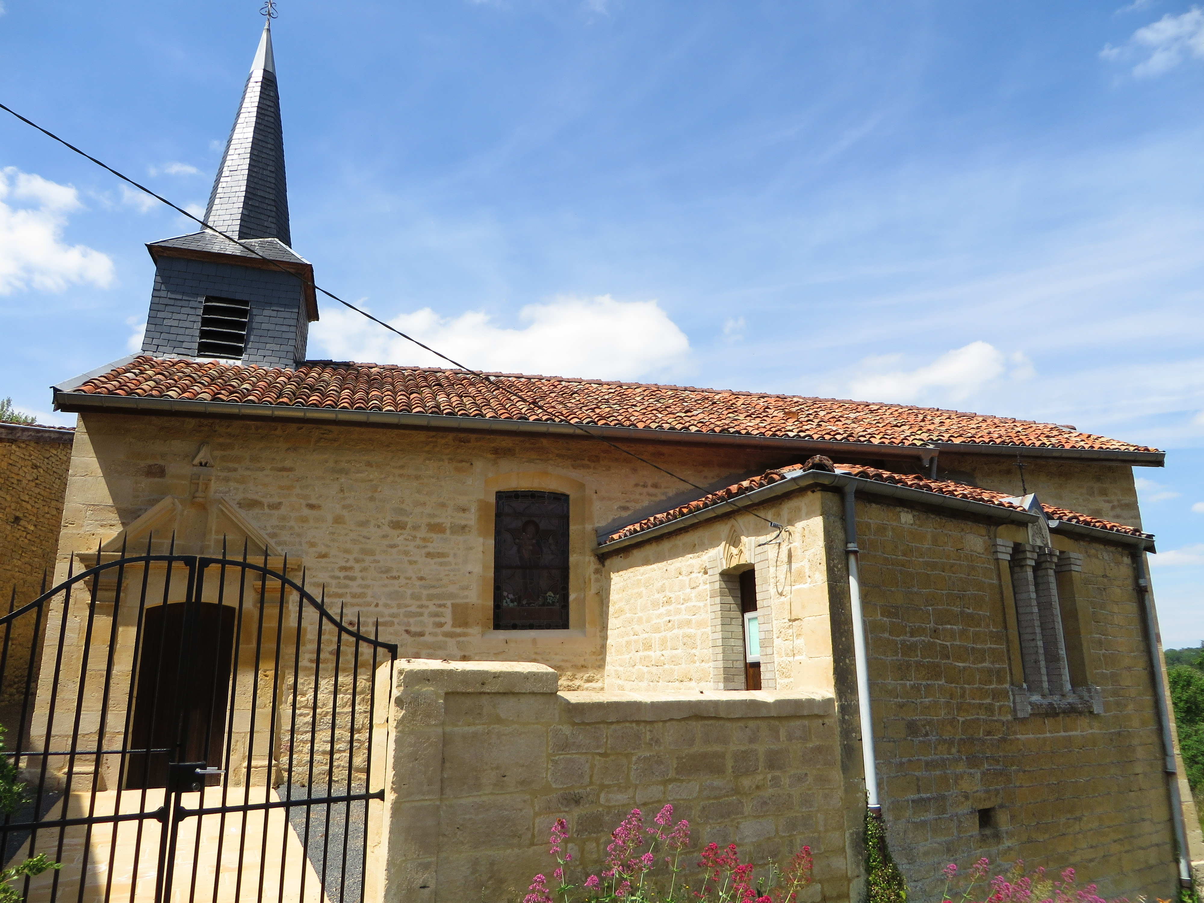 Rupt-sur-Othain L'église Saint-Nicolas